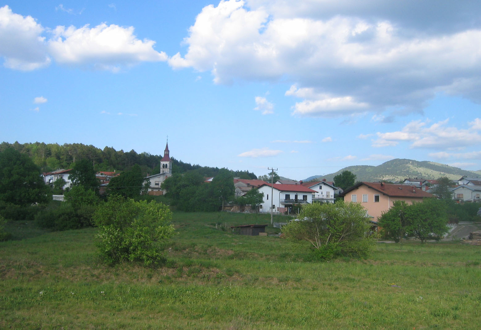 Šembije, village in Slovenia